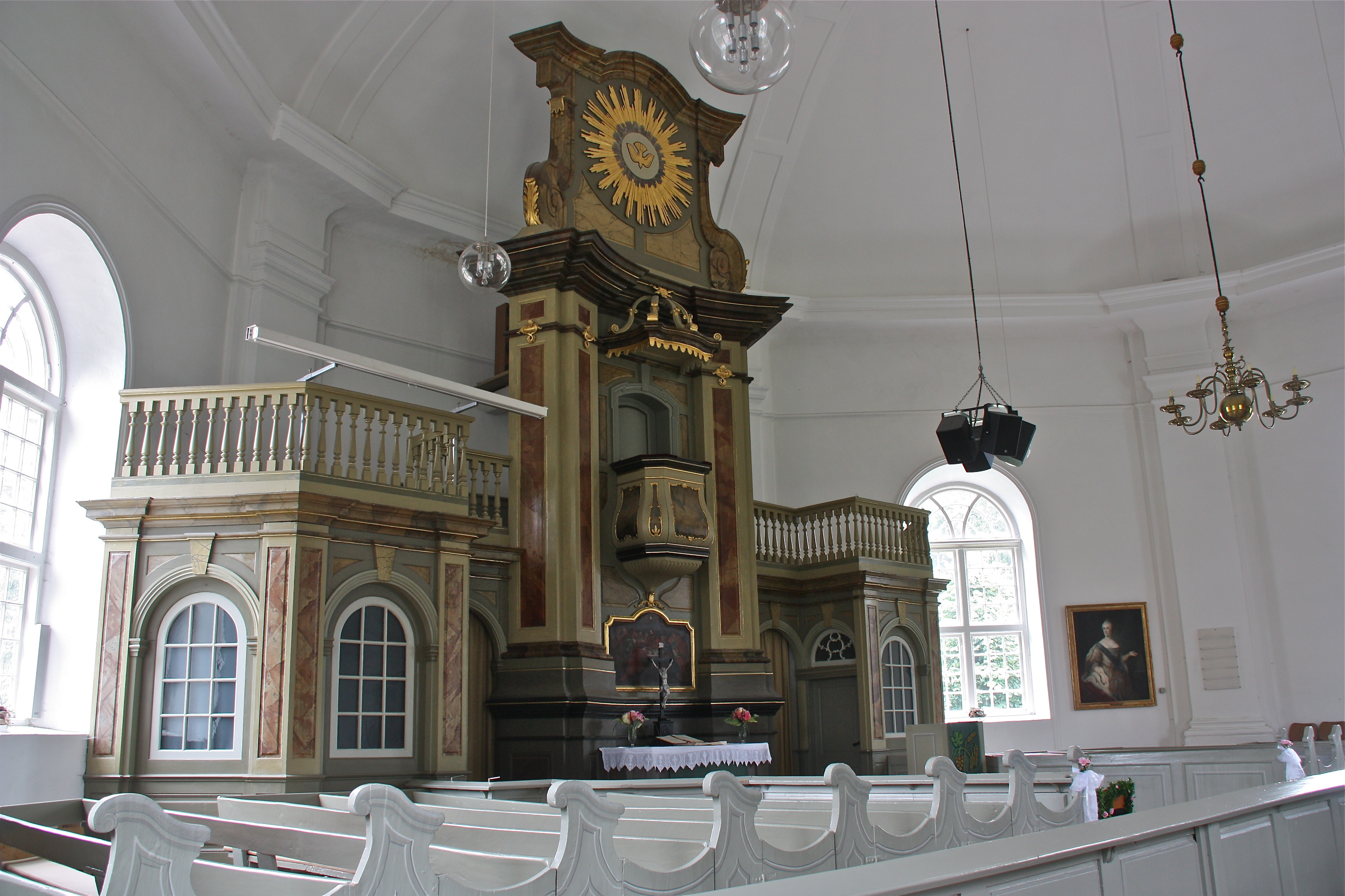 Großenaspe, Katharinenkirche, Innenraum, Blick zum Altar